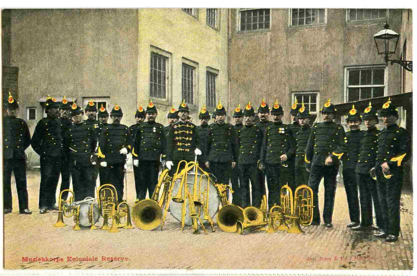 Muziekkorps Koloniale Reserve Nijmegen. het muziekkorps werd opgericht door de toenmalige commandant van de koloniale reserve Notten.